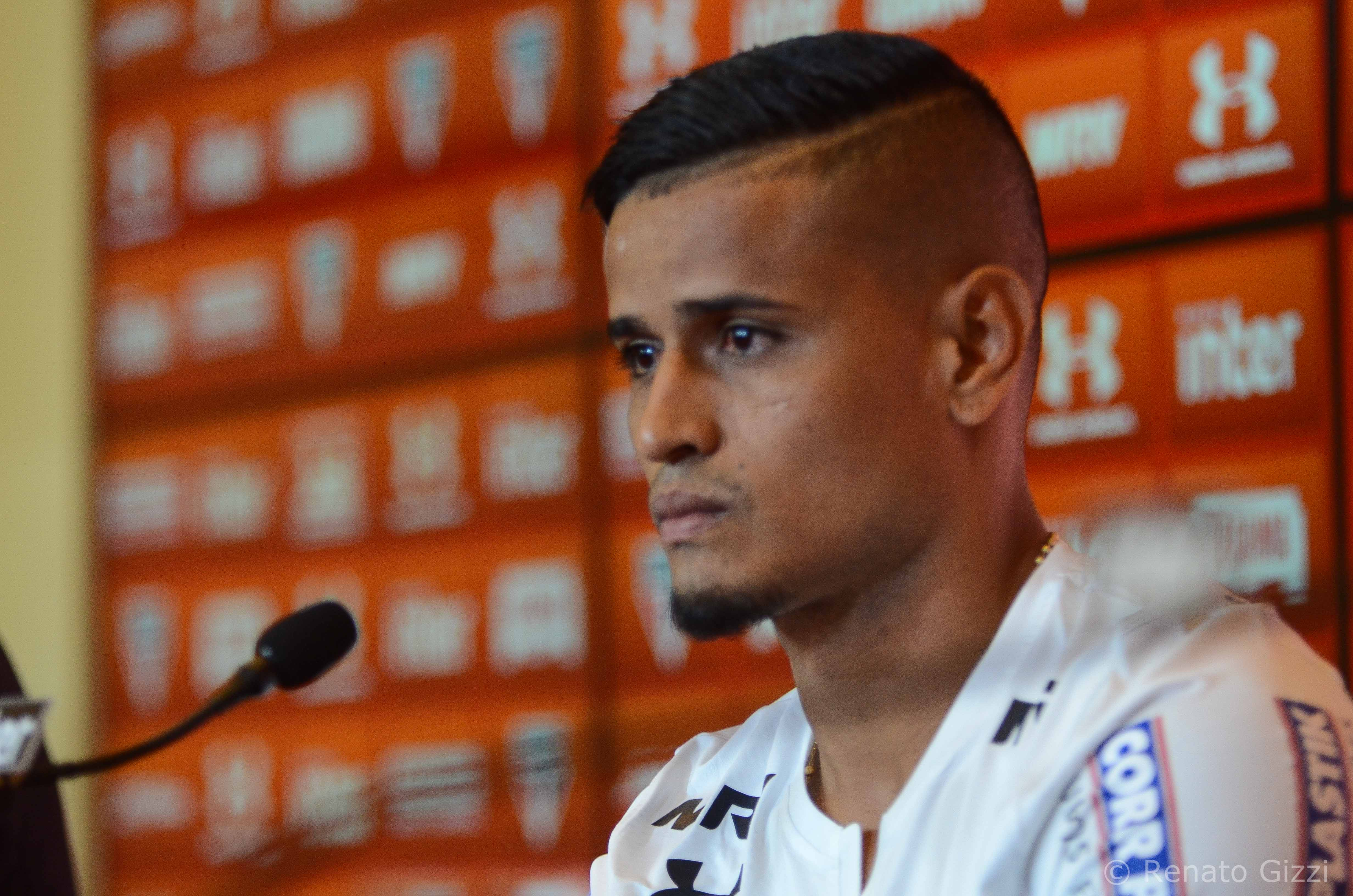 Everton em apresentação no São Paulo